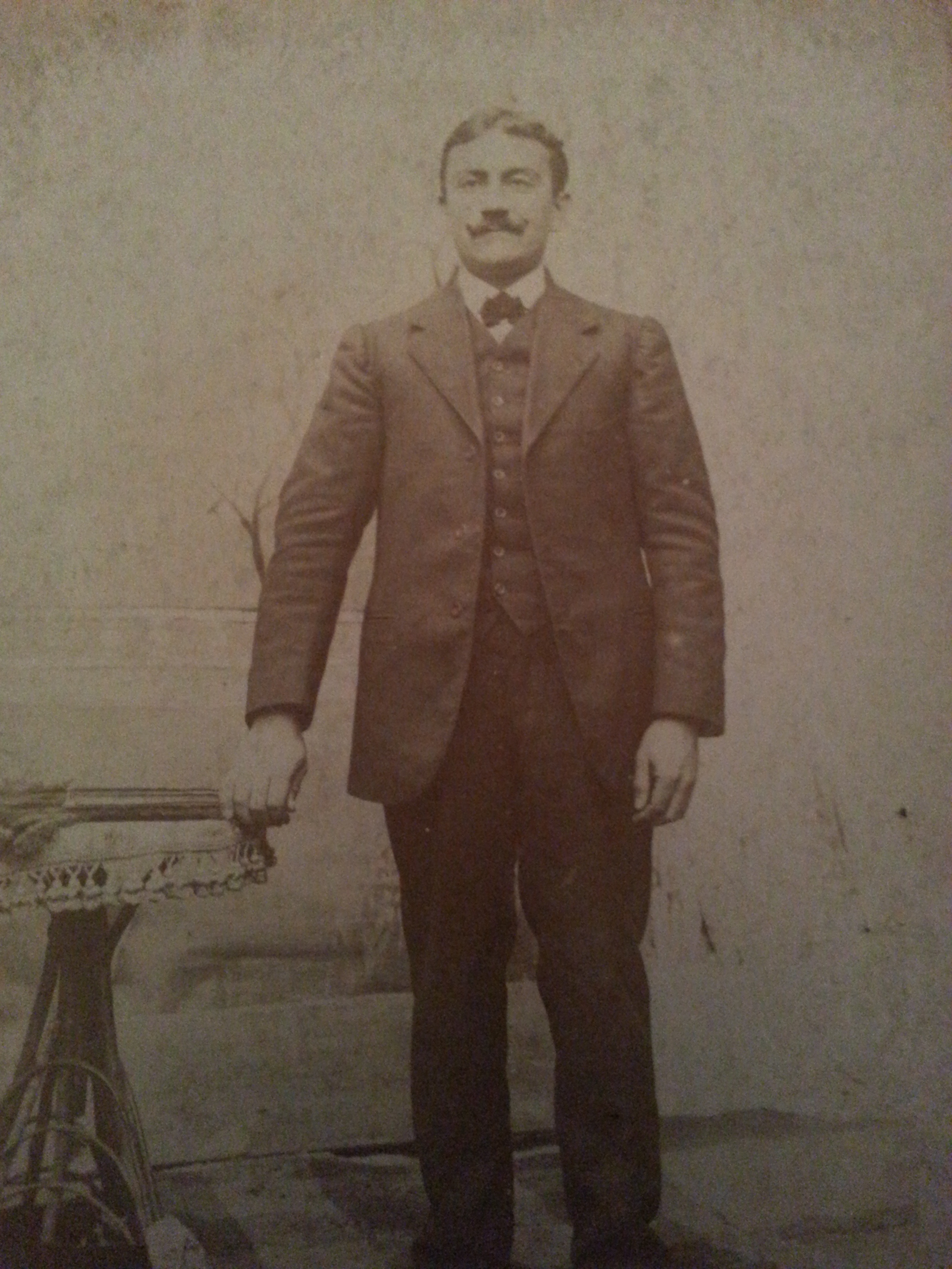 Augustin Pourreau, maire d'Aimargues dans les années 1930.